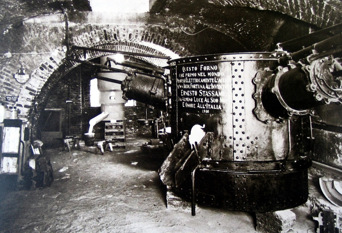 Forno elettrico Stassano (AS Brescia, Cimeli fotografici, 1920 ca)